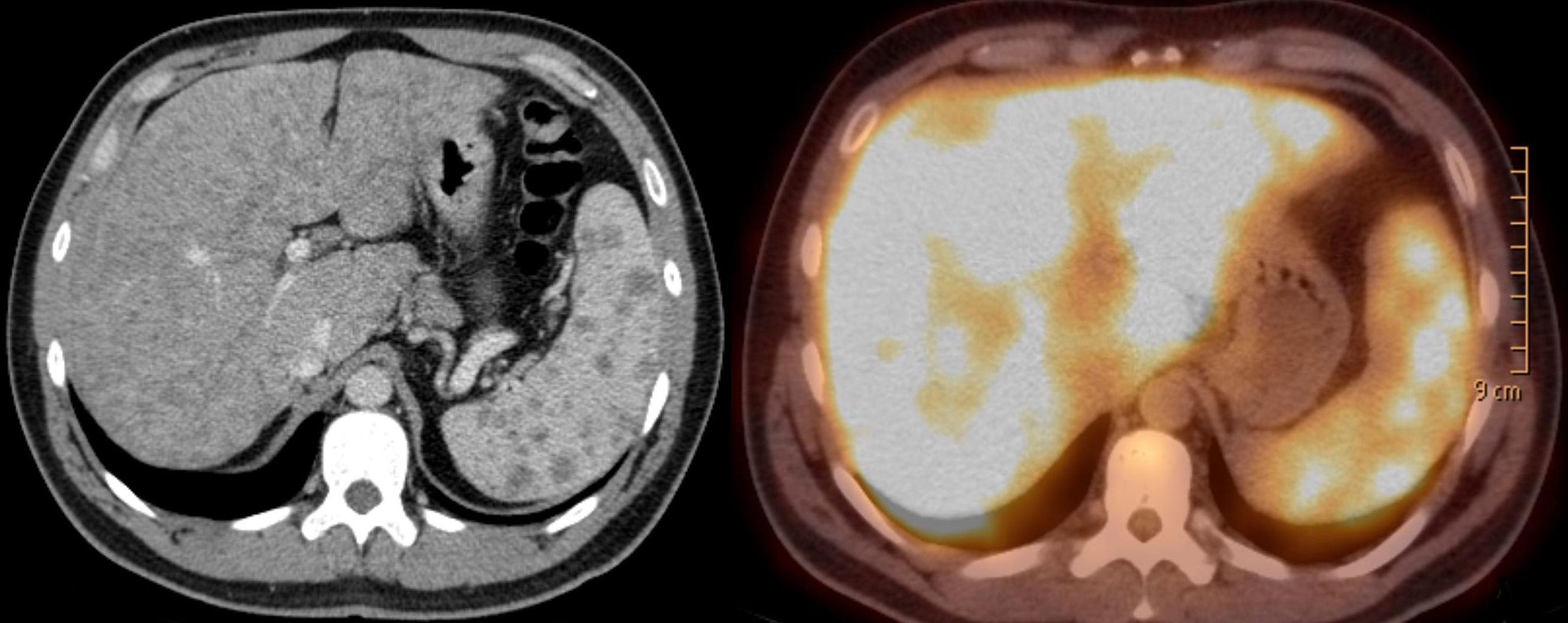 Extrapulmonale Sarkoidose bei einem 36jährigen Mann. Befall von Leber und Milz sowie der Lunge. Die Computertomographie axial zeigt multiple hypodense Herde, die primär an ein Malignom denken ließen, zumal die Befunde in der PET-CT stark stoffwechselaktiv waren.